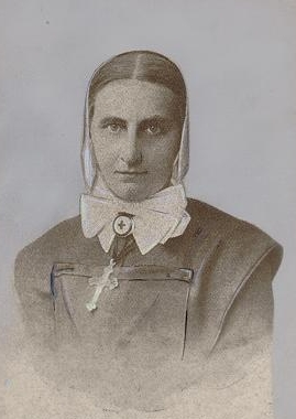 Clementine von Wallmenich (1849-1908) wurde 1894 zur Oberin der „Pflegerinnenanstalt des Bayerischen Frauenvereins vom Roten Kreuz" berufen Fotografie, koloriert, um 1890